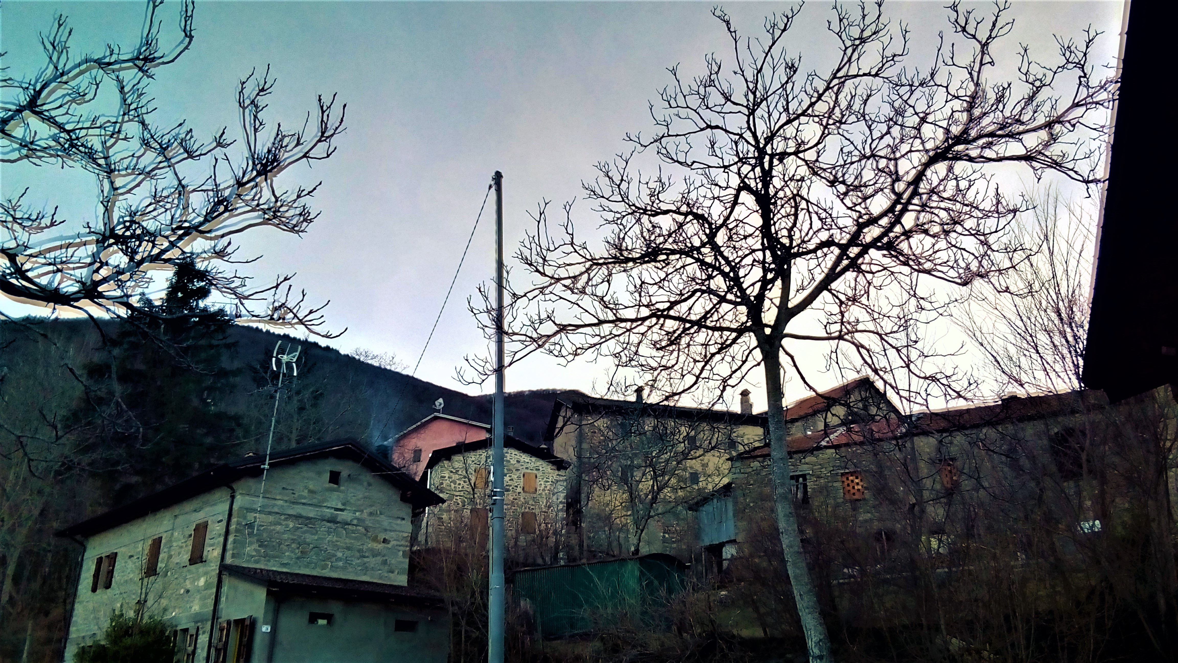 Cervarolo (Reggio Emilia)